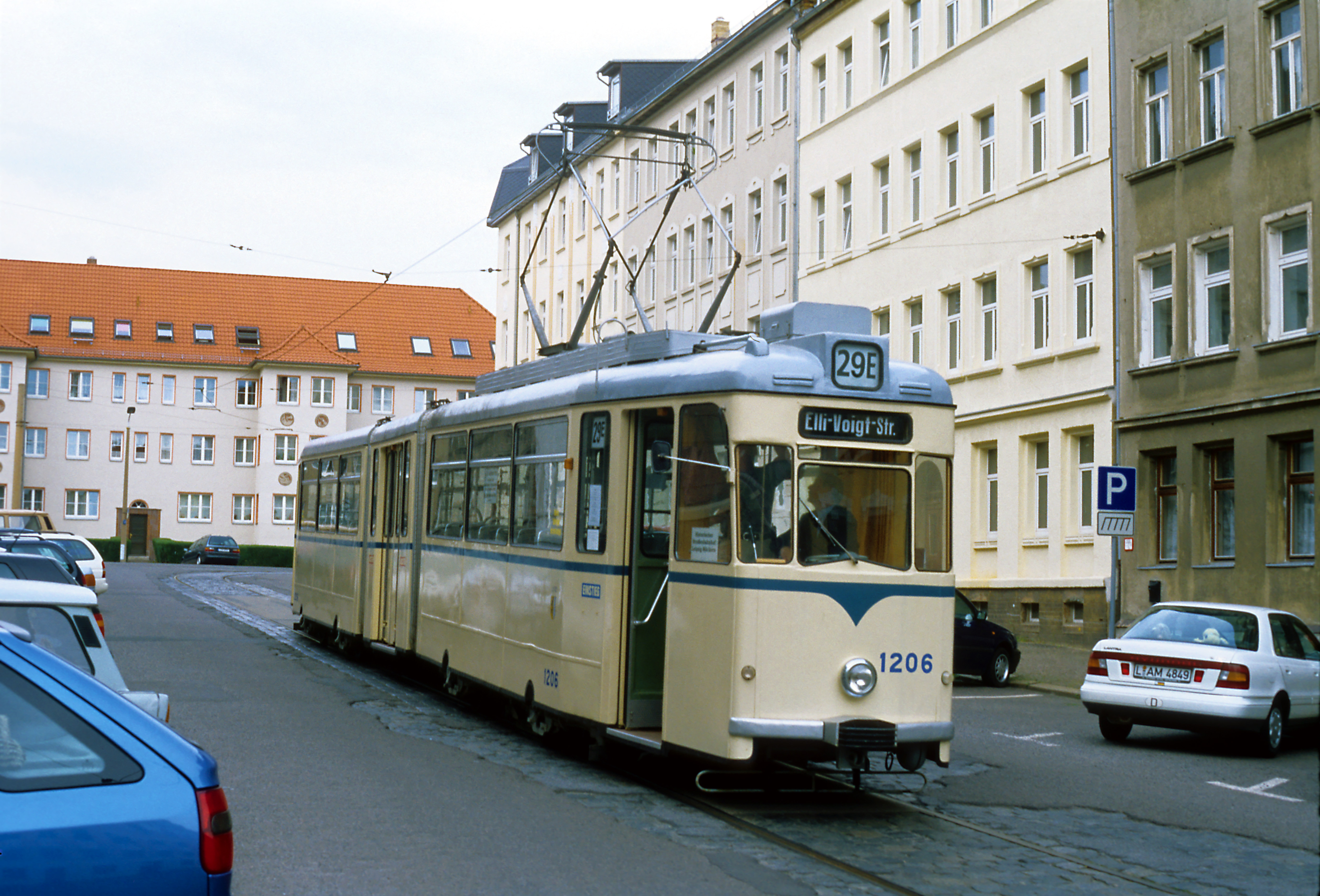 Gotha-Gelenkwagen G4-65 aus der letzten Lieferserie von 1967, Typ 32a in der Wendeschleife Elli-Voigt-Straße, im Einsatz auf der Zubringerlinie 29E zum Straßenbahnmuseum. Der Fahrgastfluss wurde auch bei den lange nach der Umstellung auf schaffnerlosen Betrieb gelieferten Gelenkwagen beibehalten. Ursprünglich sollten vorn Zeitkarteninhaber und hinten Barzahler einsteigen. Entsprechend waren die Zahlboxen nur vorn und hinten eingebaut. Beachtet wurde der Fahrgastfluss kaum, entsprechend rüstete man die Zahlboxen im Mittelteil später nach.